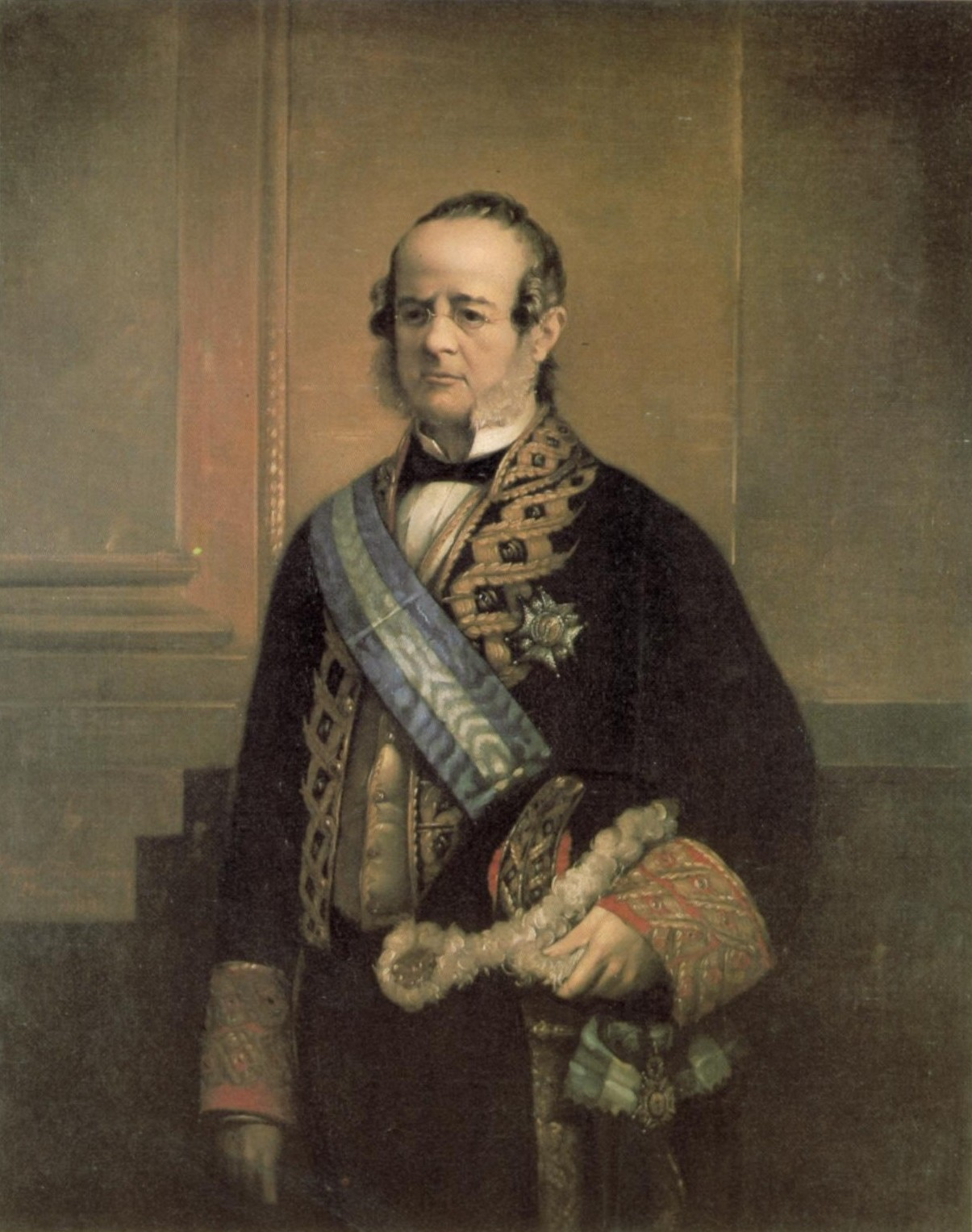 Retrato de Manuel Cantero San Vicente (1804-1876). Gobernador del Banco de España octubre de 1868 a diciembre de 1876.